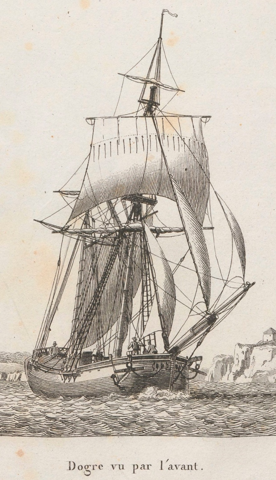 Gravure publiée en 1826 dans la Collection de toutes les espèces de bâtiments de guerre et de bâtiments marchands qui naviguent sur l'Océan et dans la Méditerranée, dessinée d'après nature et gravée par Baugean mais réalisée avant 1819 (date de la mort de l'auteur).